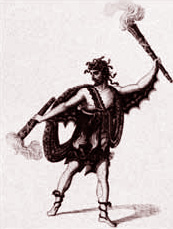 Andrea Nozzari (1775 – 1832) as Poliflegonte in Simone Mayr's Il sogno di Partenope